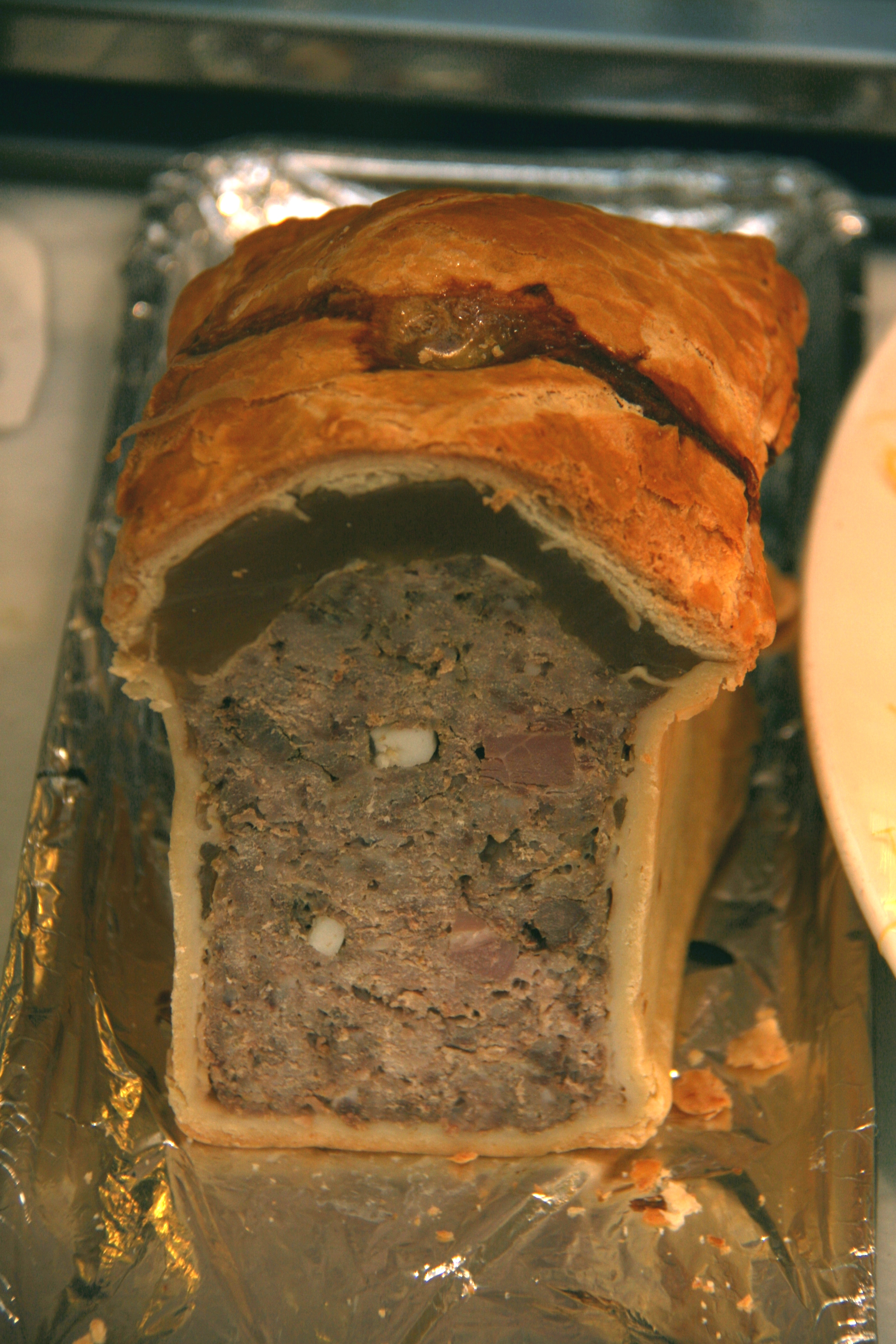 Pastel de liebre - Lhardy